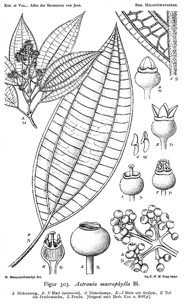 Astronia macrophylla Bl.